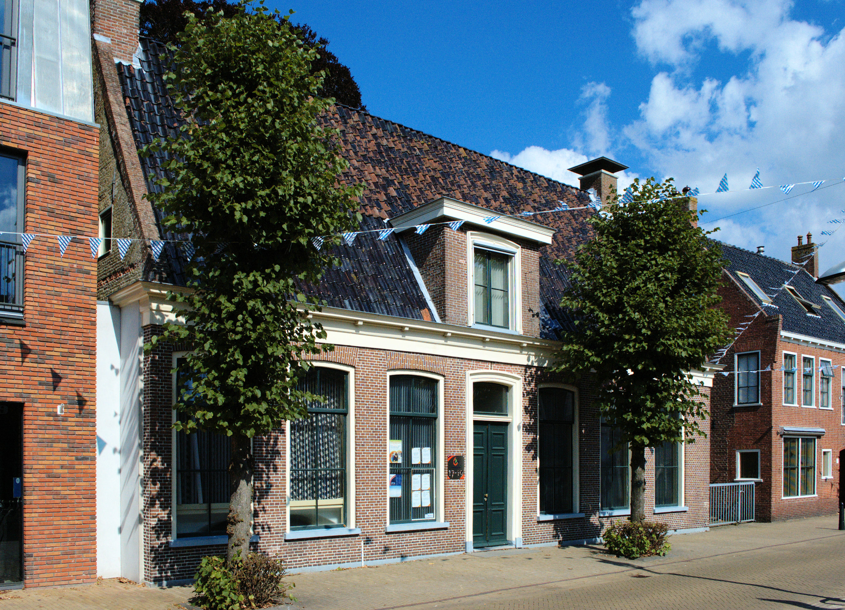 Schoolstraat 17, Burgum